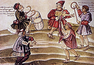 zambra morisca